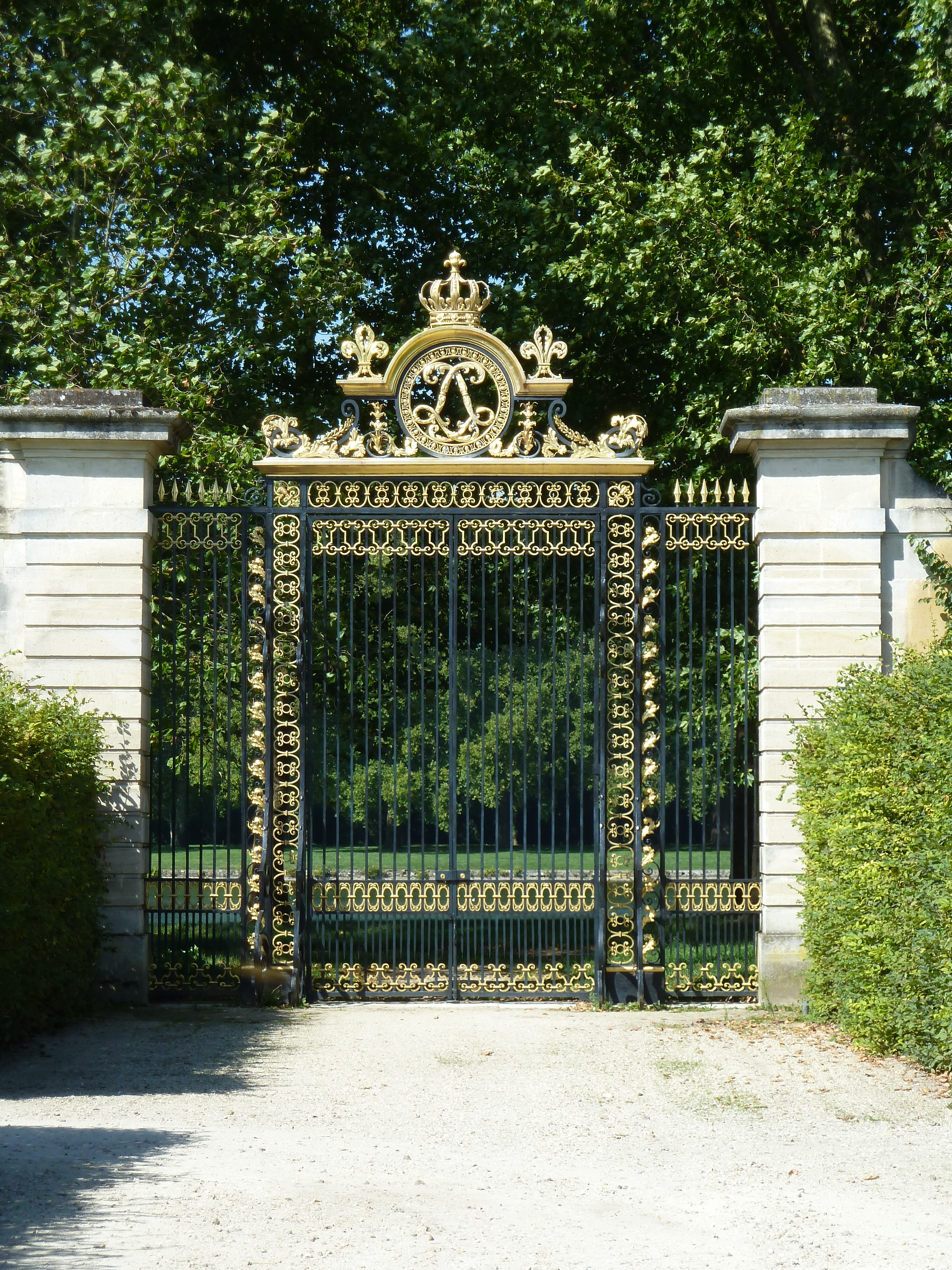 Versailles Potager du Roi Grille du Roi. Louis XIV entrait dans son potager par cette grille. C'est l'une des plus belles de Versailles. Elle compte parmi les rares grilles d'origine. La WMF (World Monuments Fund) a contribué a sa restauration en 1993.